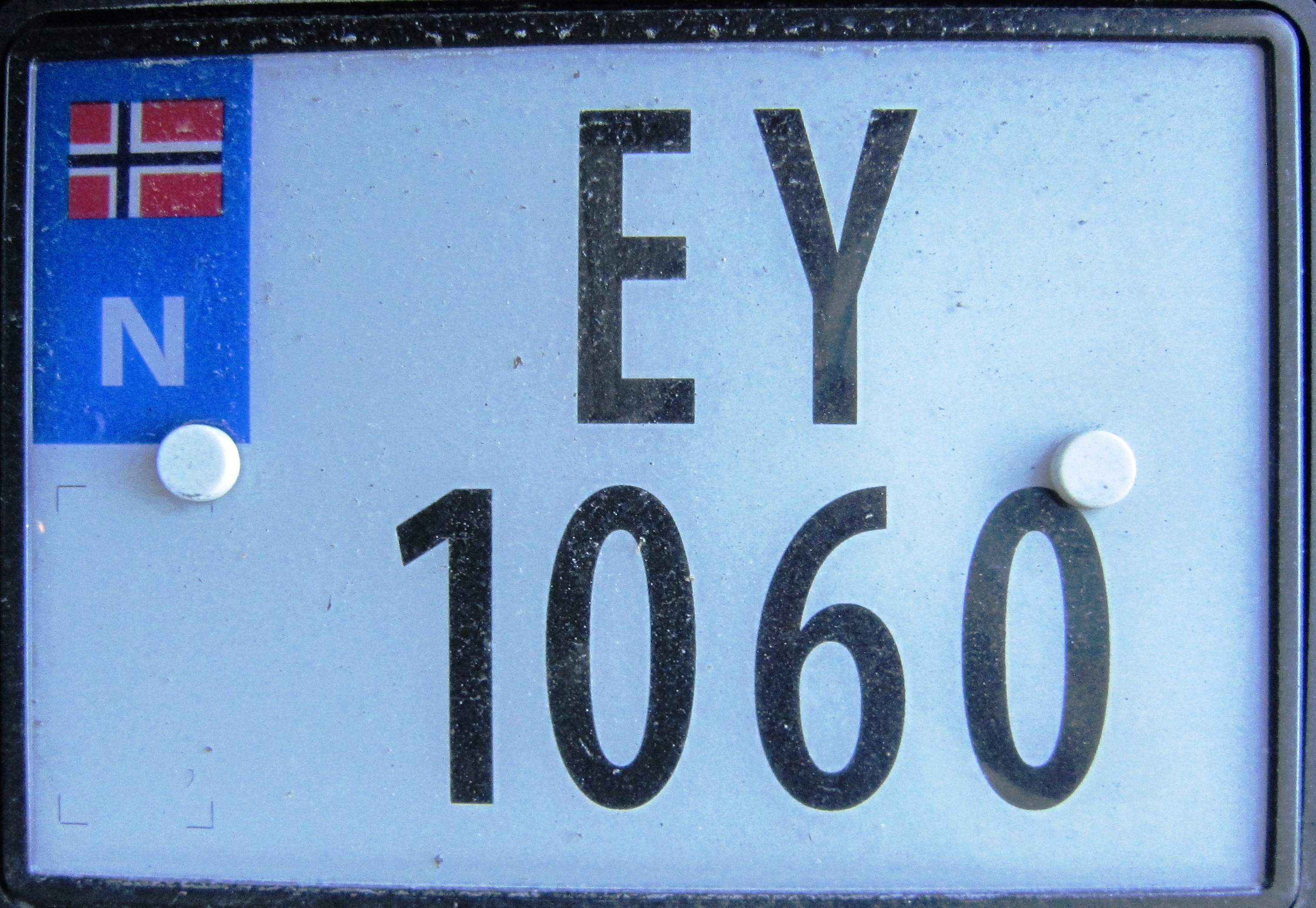 Noorwegen kenteken motorfiets